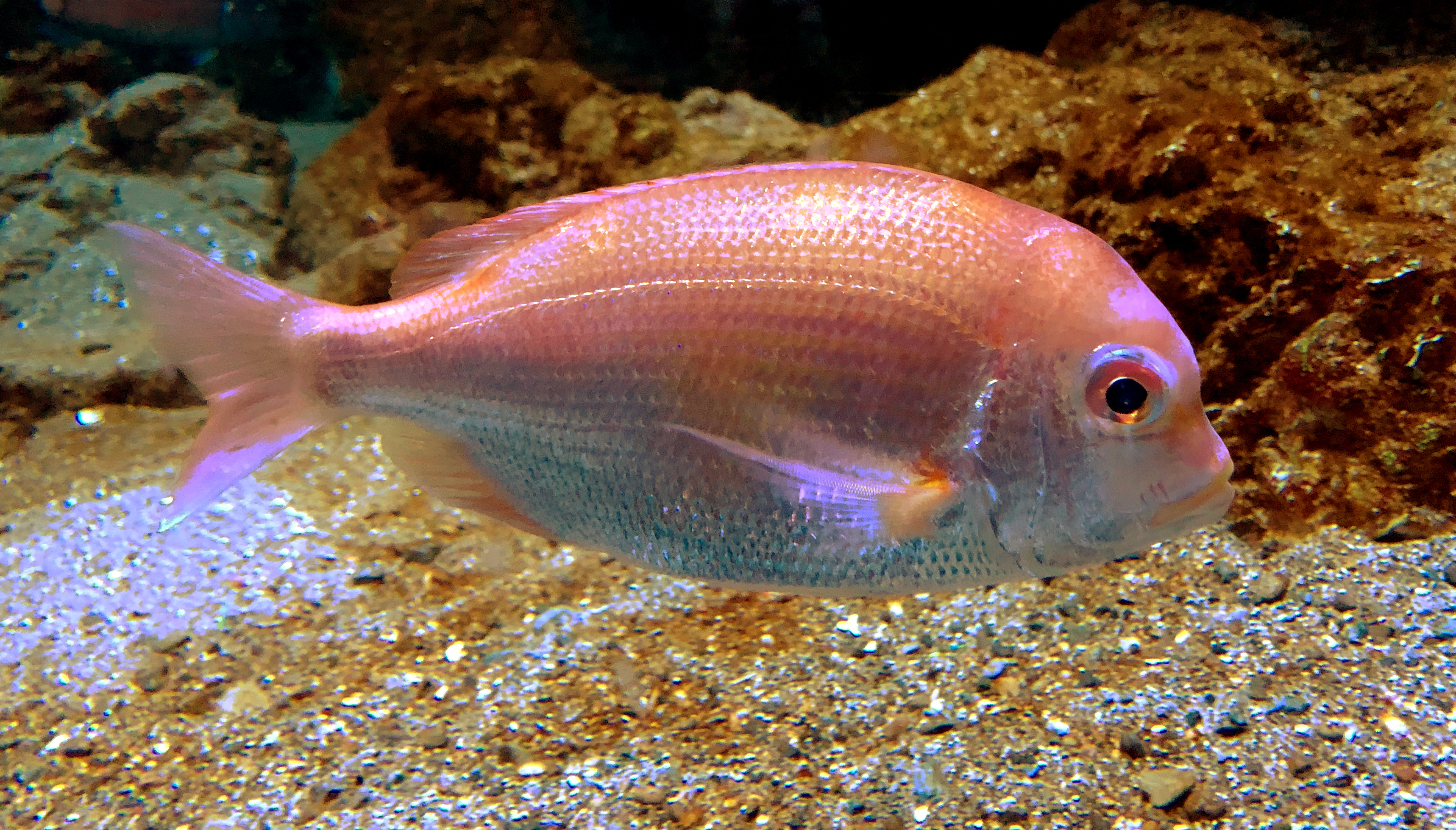 キダイ。京都水族館飼育個体。